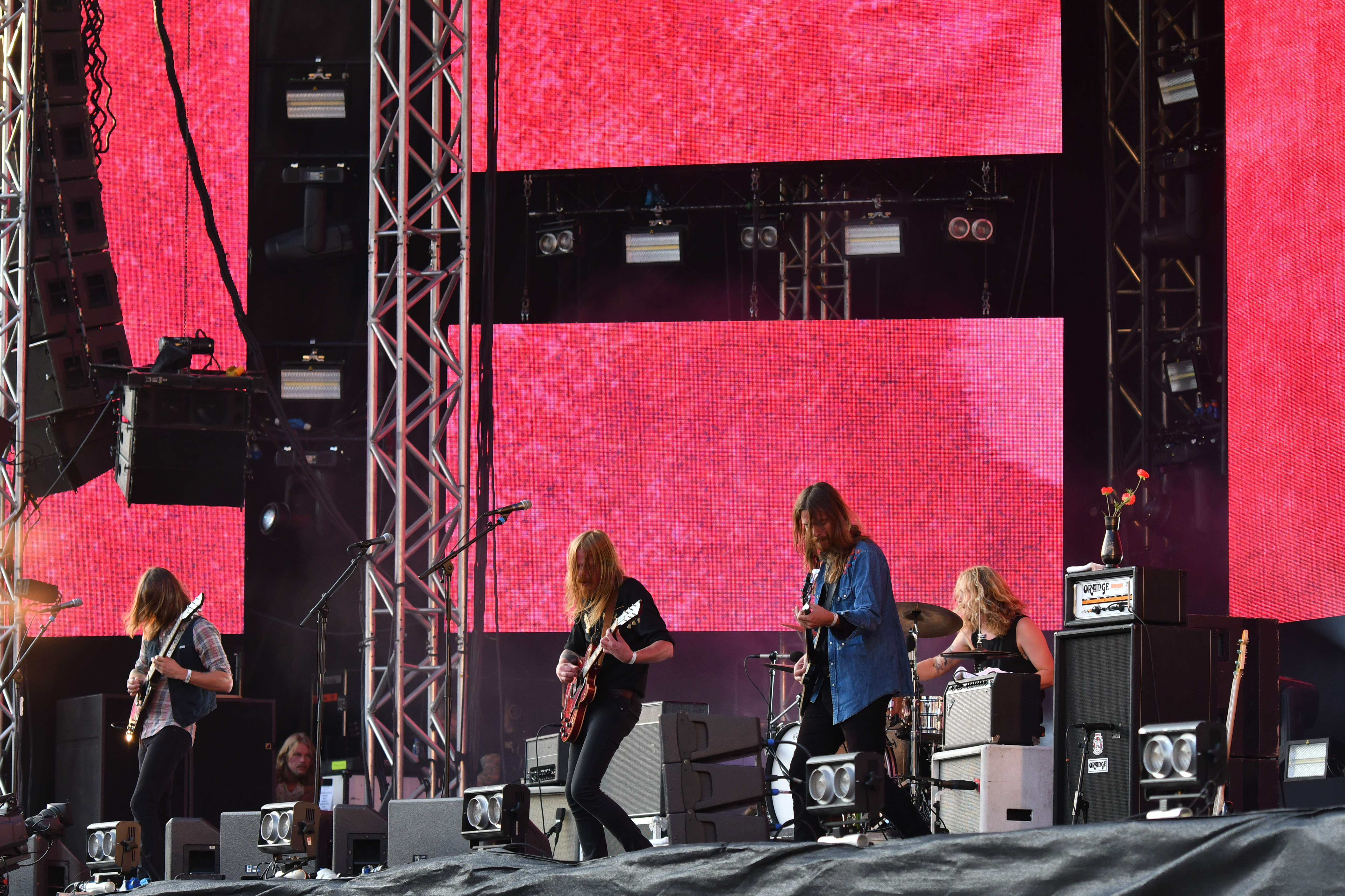 Graveyard på Malmöfestivalen 2018.